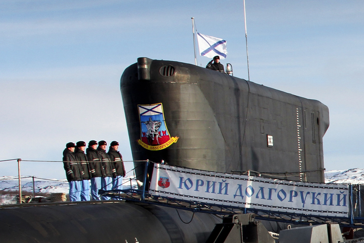 Базовая подготовка первого экипажа головного корабля проекта 955 «Борей» ракетного подводного крейсера стратегического назначения Северного флота «Юрий Долгорукий» (Мурманская область)